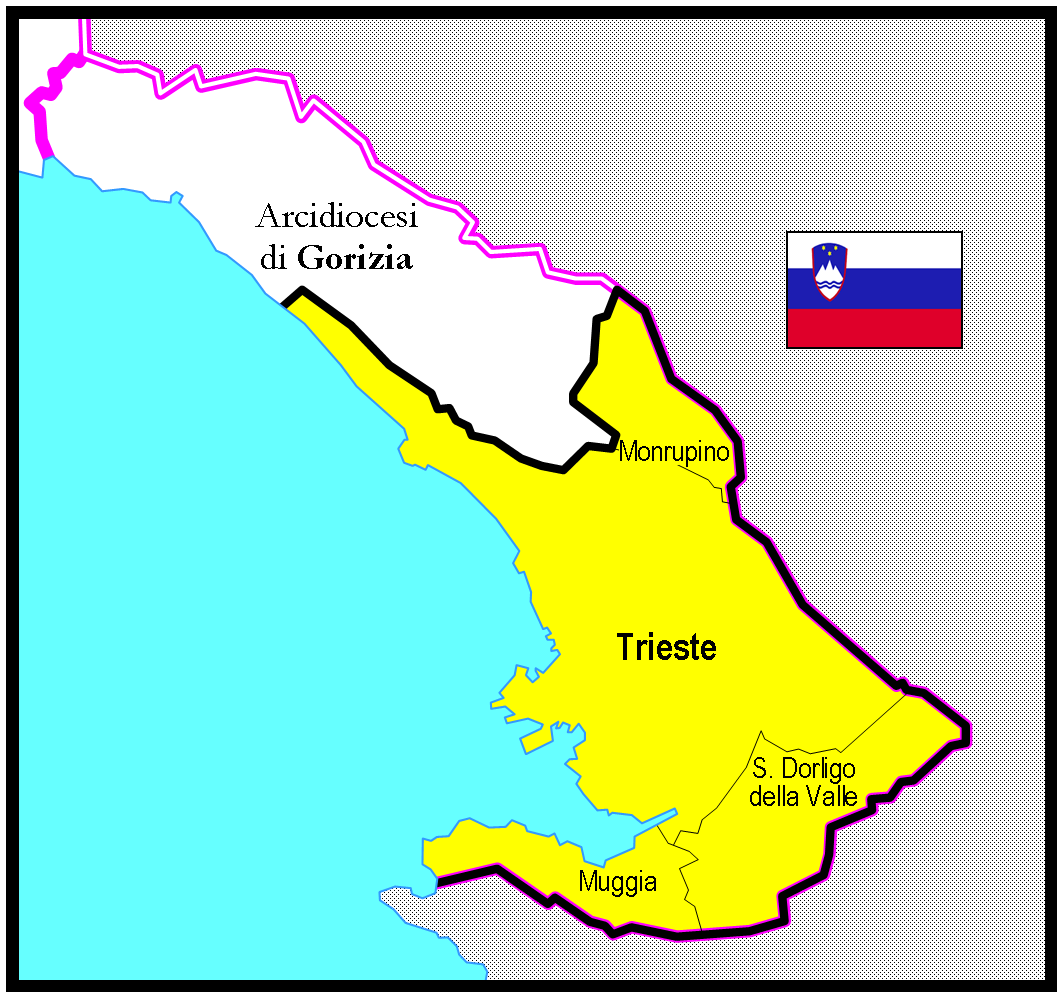 Mappa Diocesi di Trieste